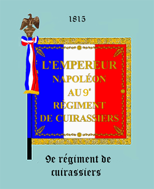 Standarte Modell 1815 des französischen Kürassierregiments Nr. 9 (Vorderseite)